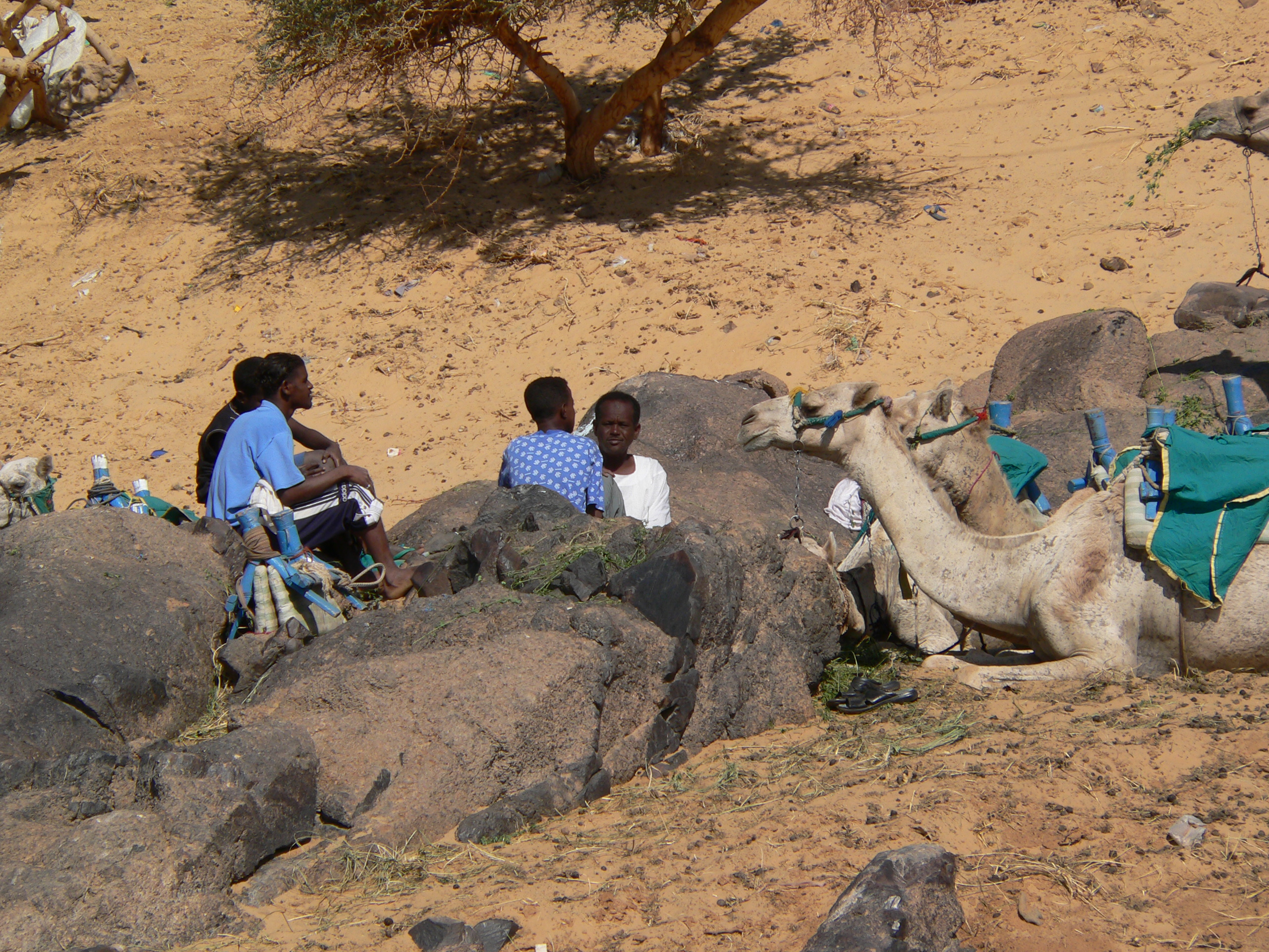 Nubians on Nile banks April 2005 M. Disdero